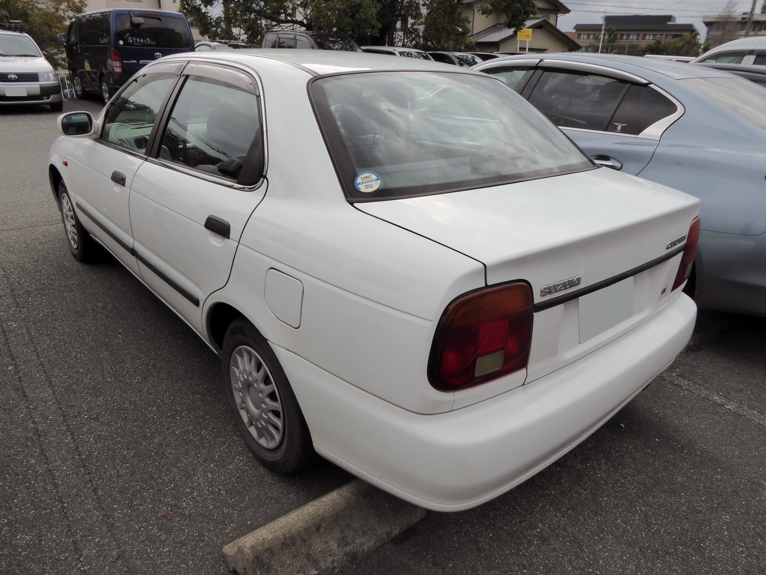 GC21S型スズキ・カルタス1500FSをリアから撮影。